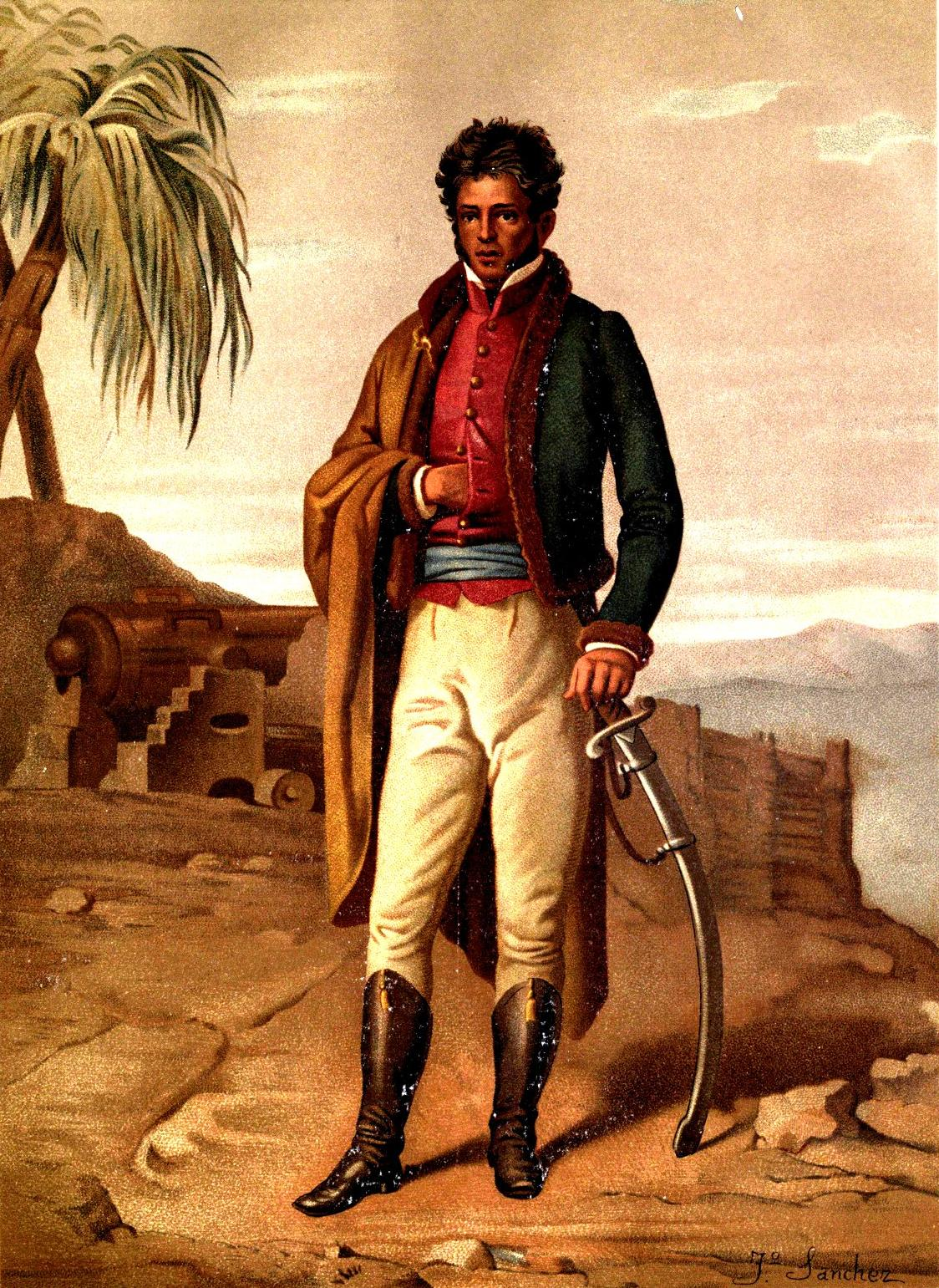 Imagen extraida del libro de Vicente Riva Palacio, Julio Zárate (1880) "México a través de los siglos" Tomo III: "La guerra de independencia" (1808 - 1821)